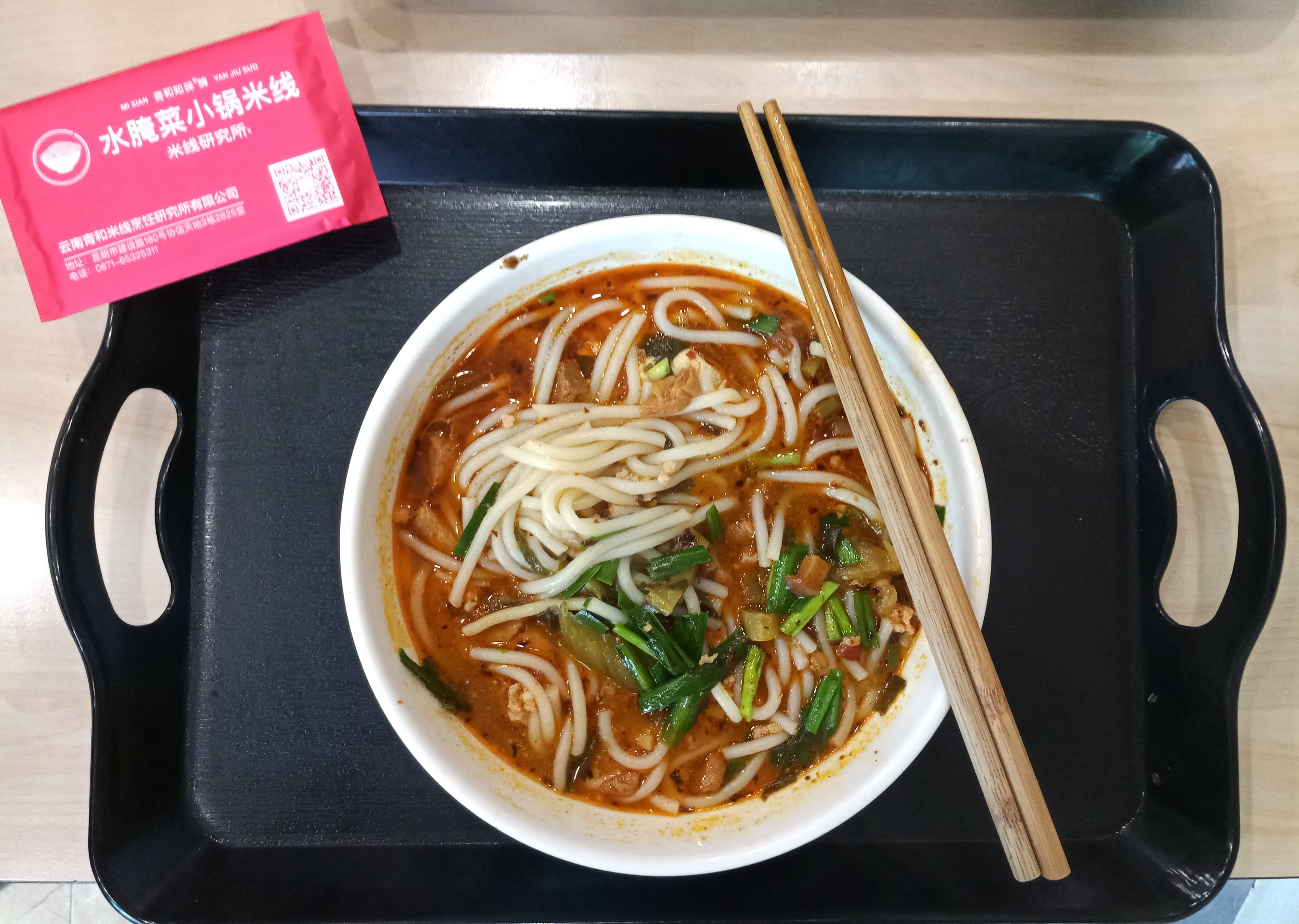 中文（中国大陆）: 昆明青和小锅米线